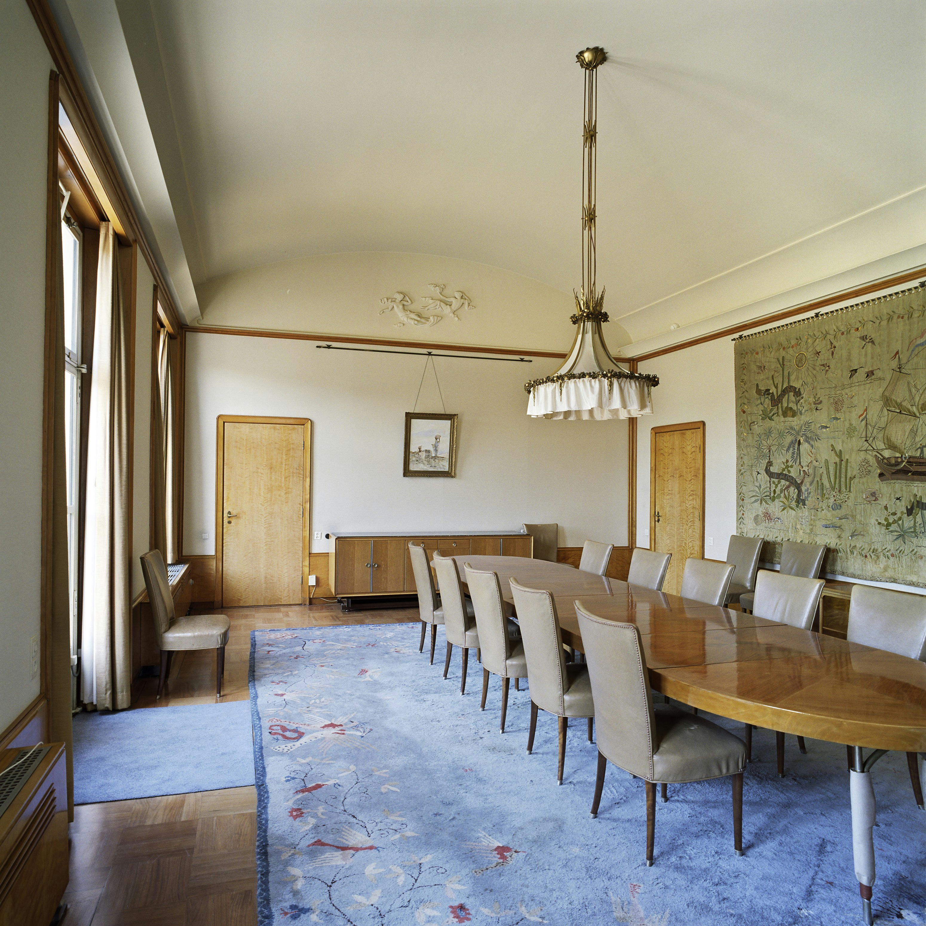 Paleis Soestdijk: Interieur, overzicht van de eetkamer met wandtapijt en meubilair, gelegen aan de achterzijde van het middengedeelte tussen het corps de logis en de Baarnse vleugel